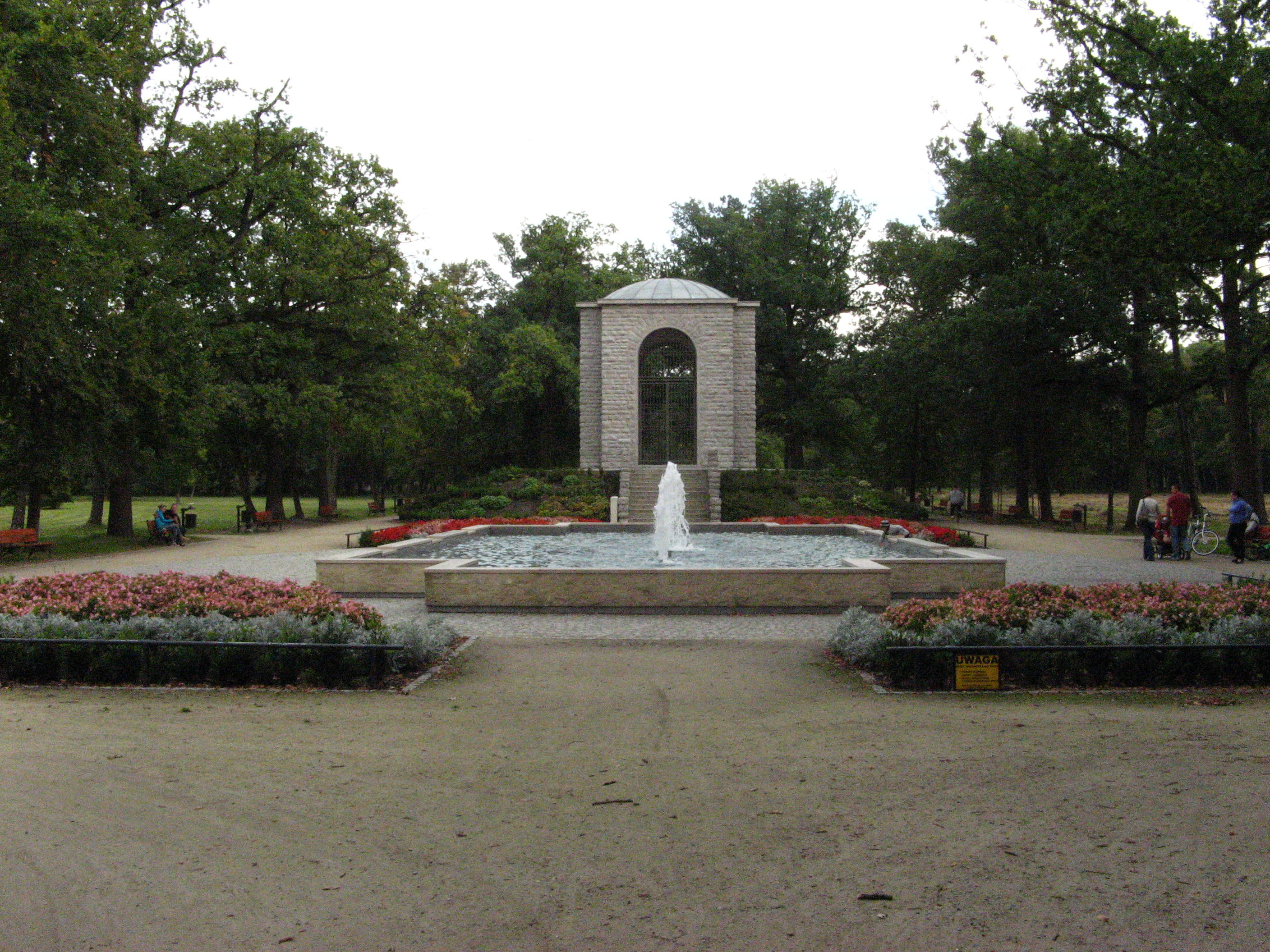 Kluczbork - park miejski, kon. XIX, po 1920